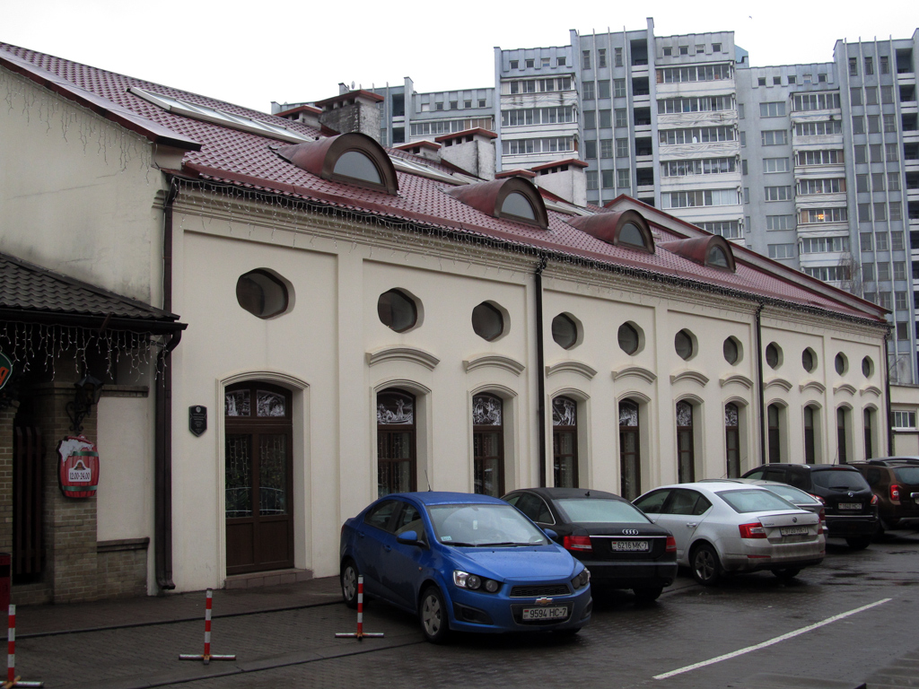 Мінск. Вуліца Віцебская, 10